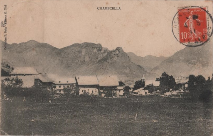 carte postale ancienne de Champcella.